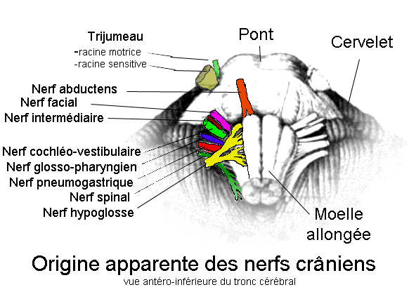 Origine apparente des ners crâniens. Vue antéro-inférieure du tronc cérébral. Anatomie humaine